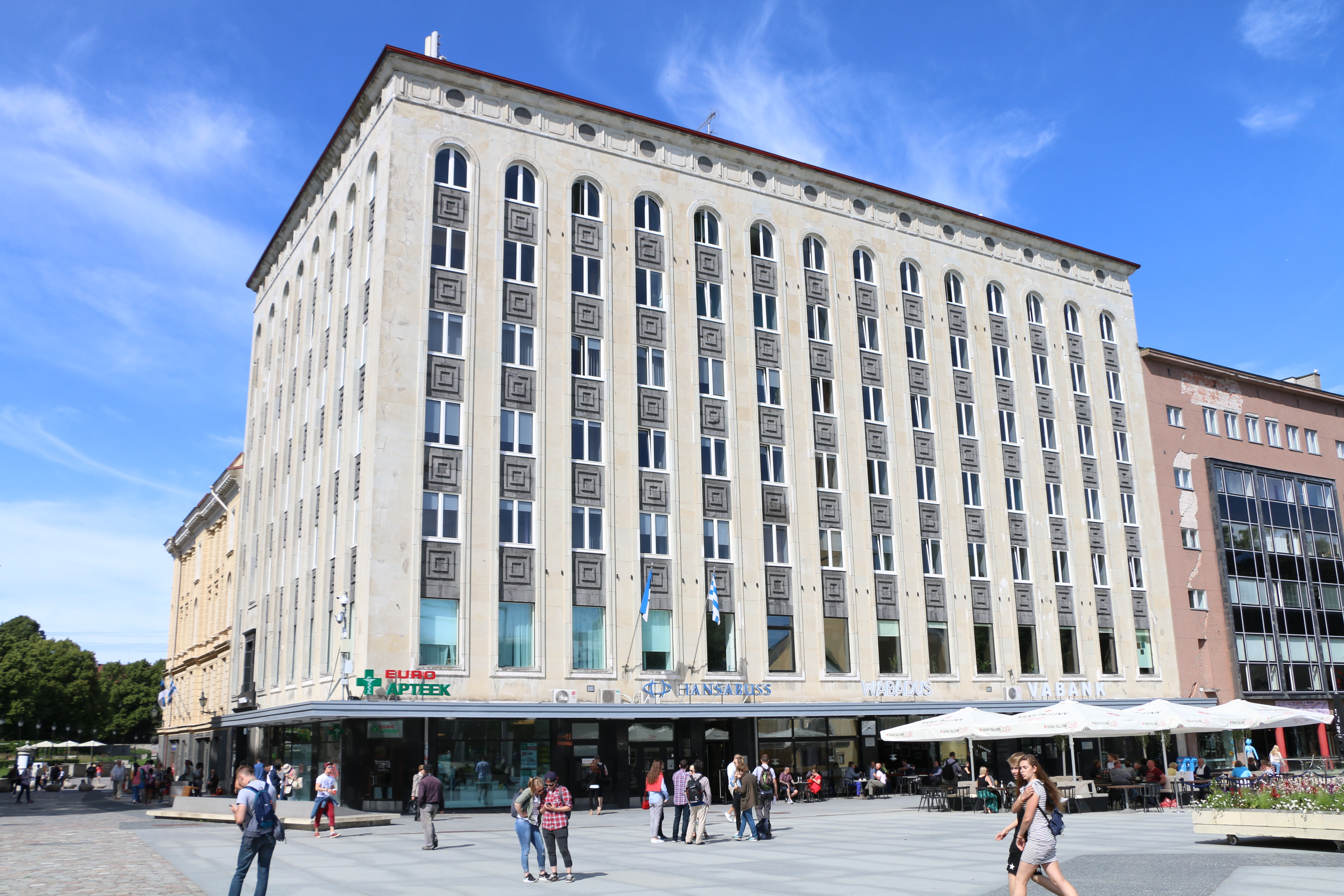 Vabaduse väjak 10 hoone Harju tänava poolt diagonaalis